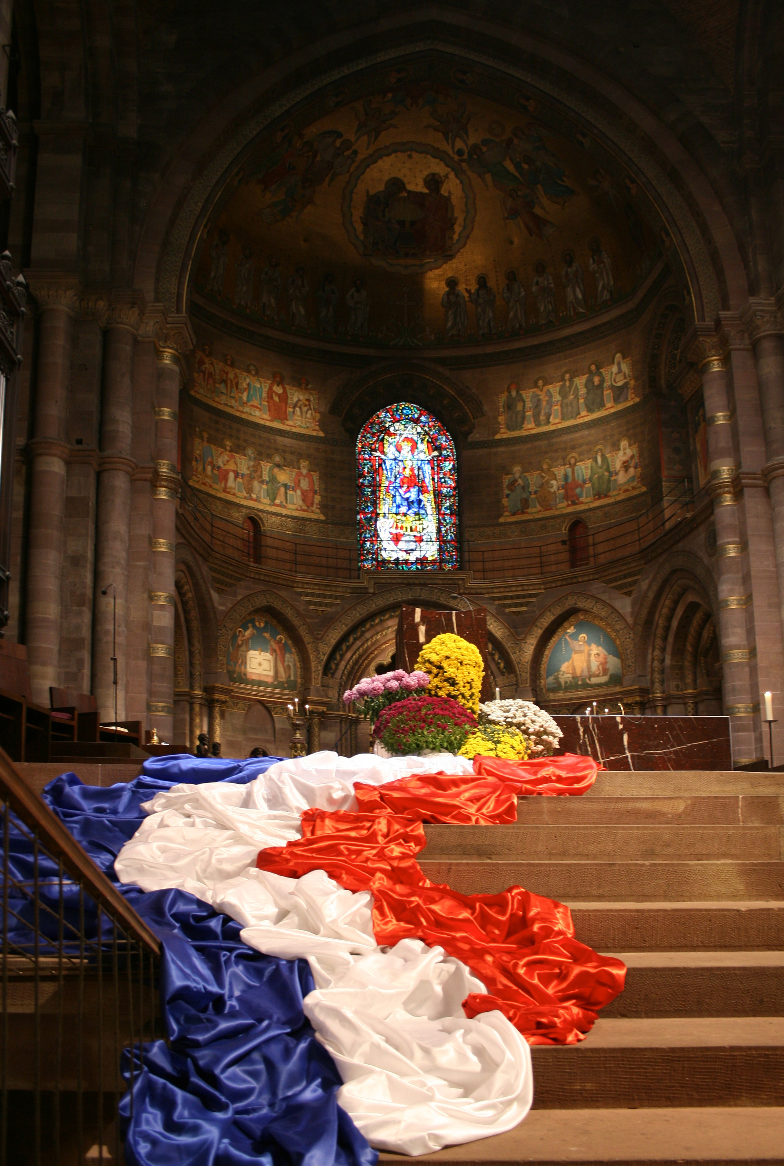 Pavoisement du chœur de la Cathédrale de Strasbourg à l’occasion de l’anniversaire de la Libération de la ville